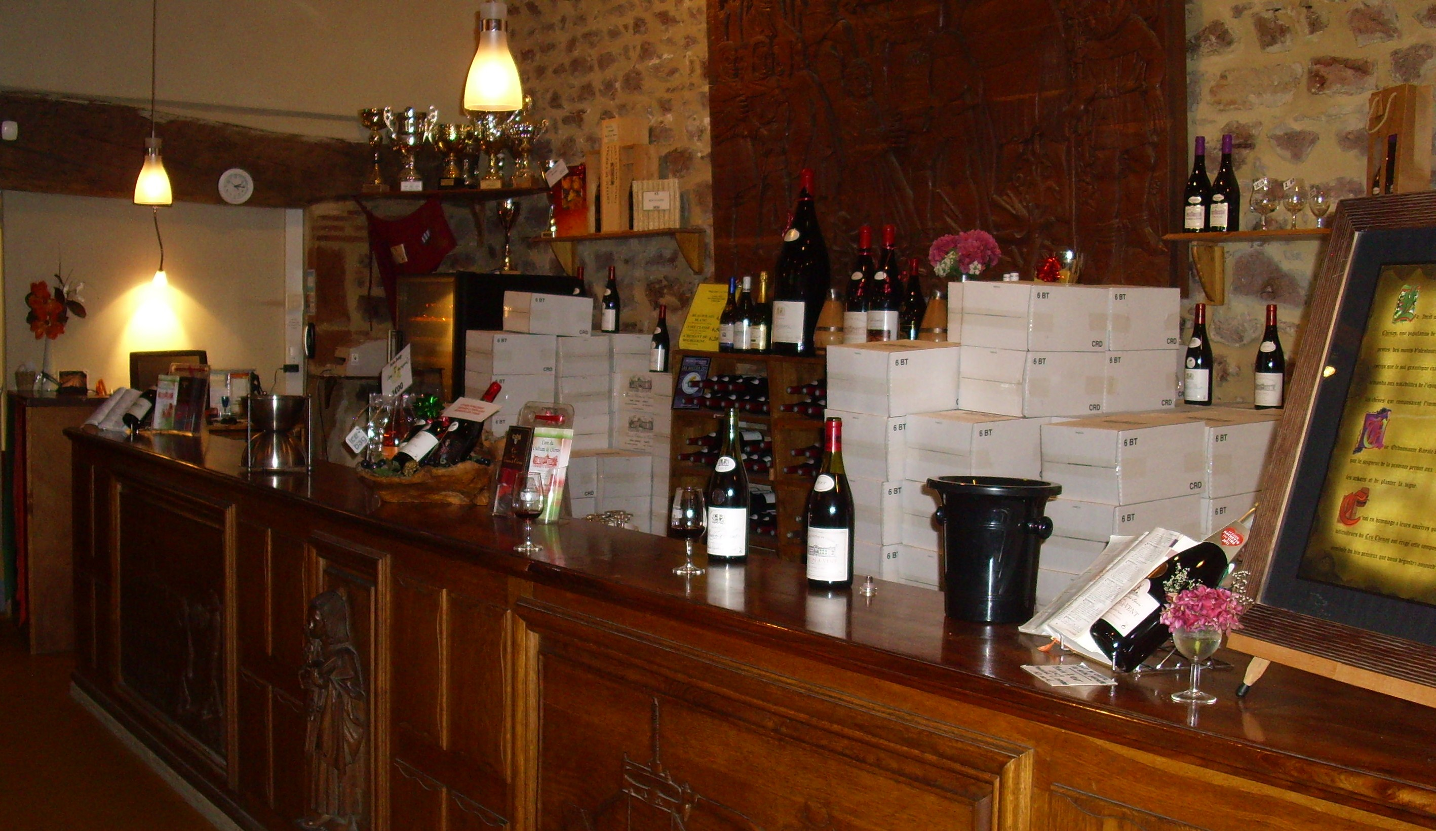 Caveau de dégustation de vin du Chateau de Chénas (69)